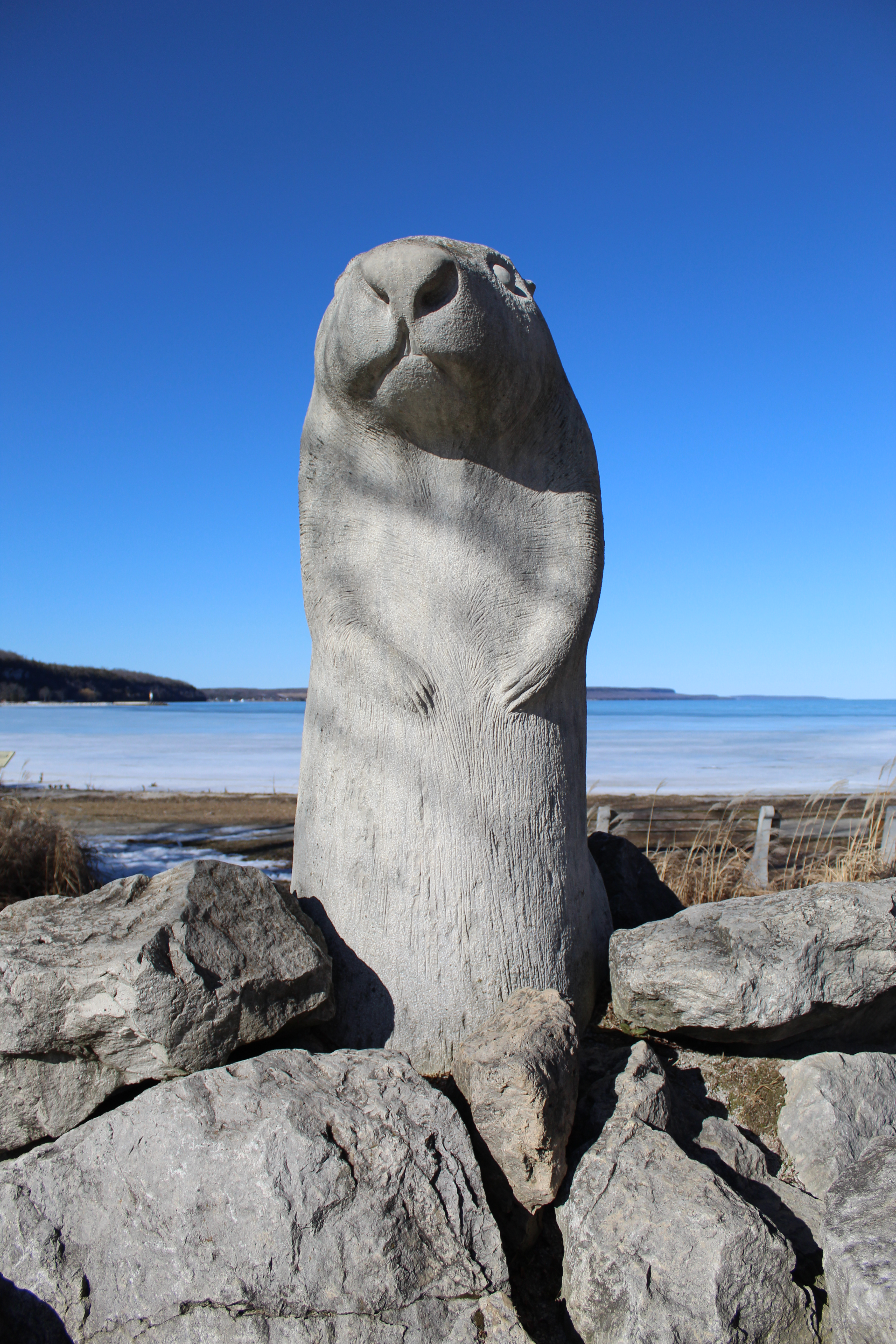 Wiarton Willie, Wiarton, Ontario, Canada